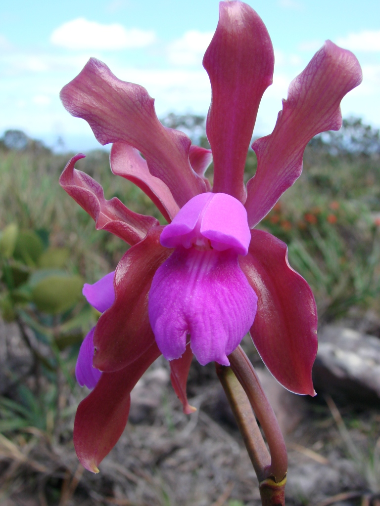 Flower of Cattleya elongata - ORCHIDACEAE Parque Natural Municipal Morro do Pai Inácio - Palmeiras - Bahia - Brasil.